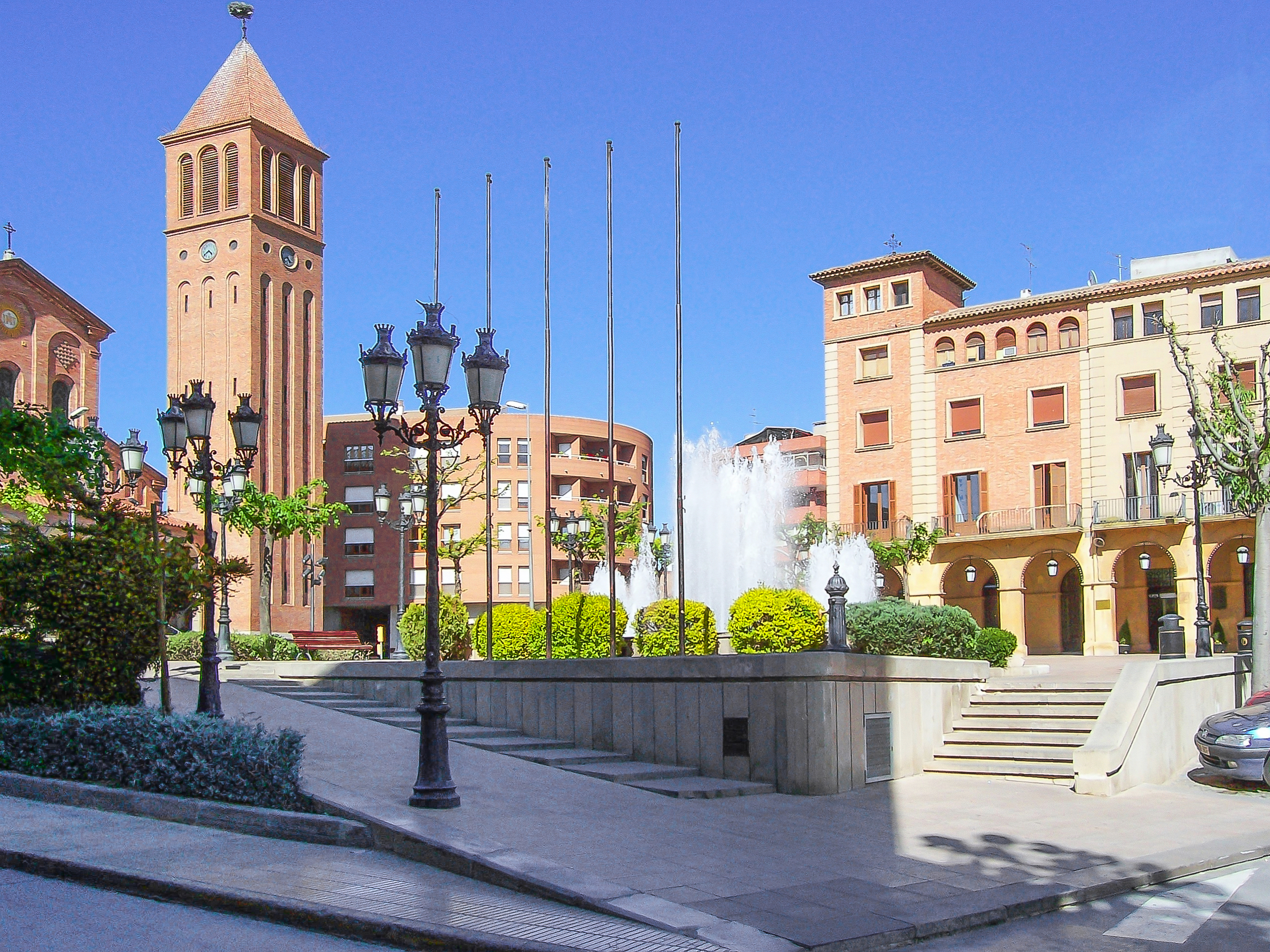 Plaça de l'Ajuntament (Town Hall Square). Object location41° 37′ 47.24″ N, 0° 53′ 37.36″ E